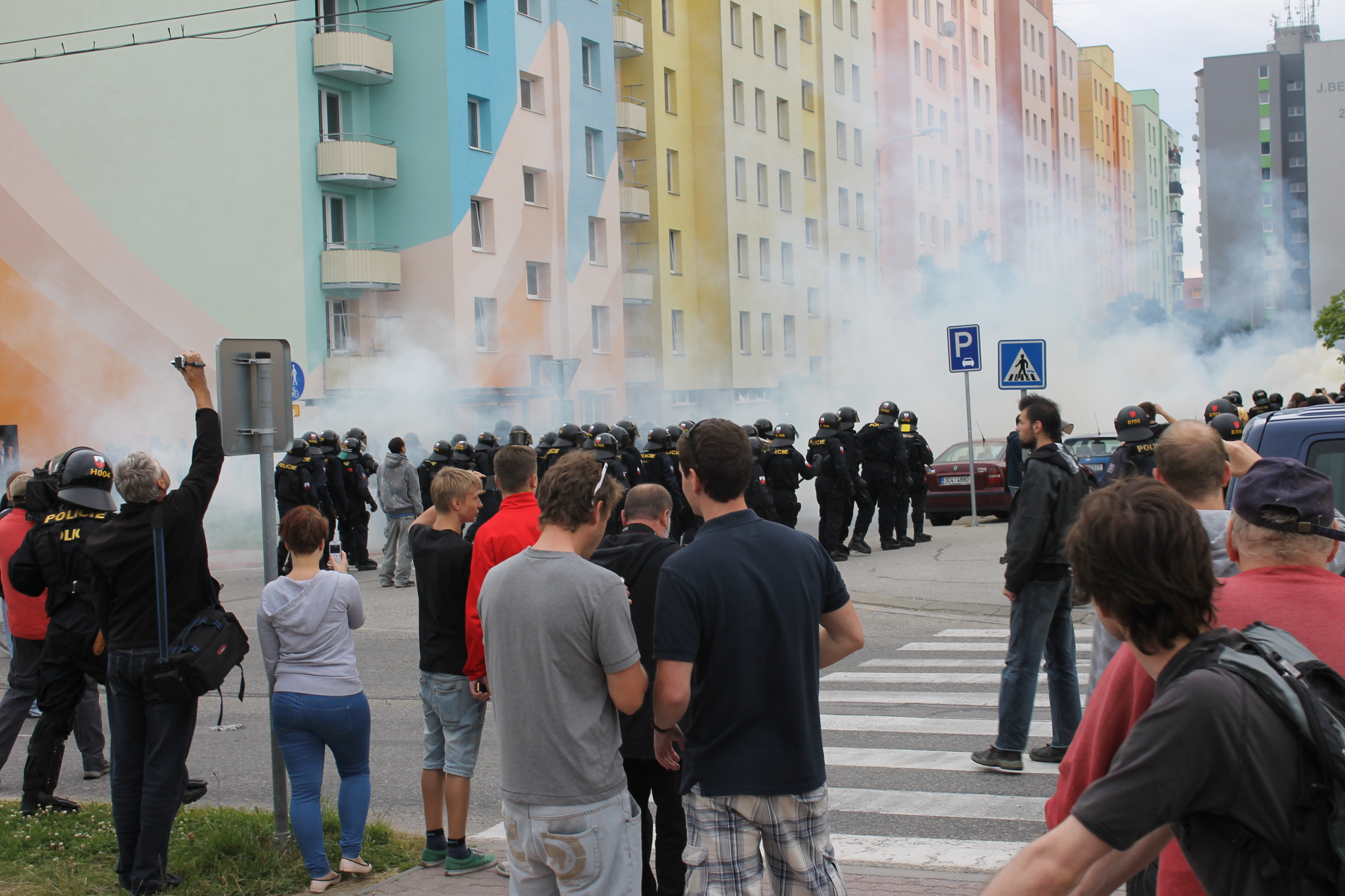 Těžkooděnci zasahující během protestu na sídlišti Máj v ulici Jaroslava Bendy v Českých Budějovicích 29.6.2013.